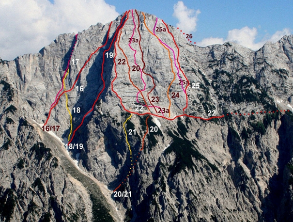 Trentski Pelc in smeri v steni